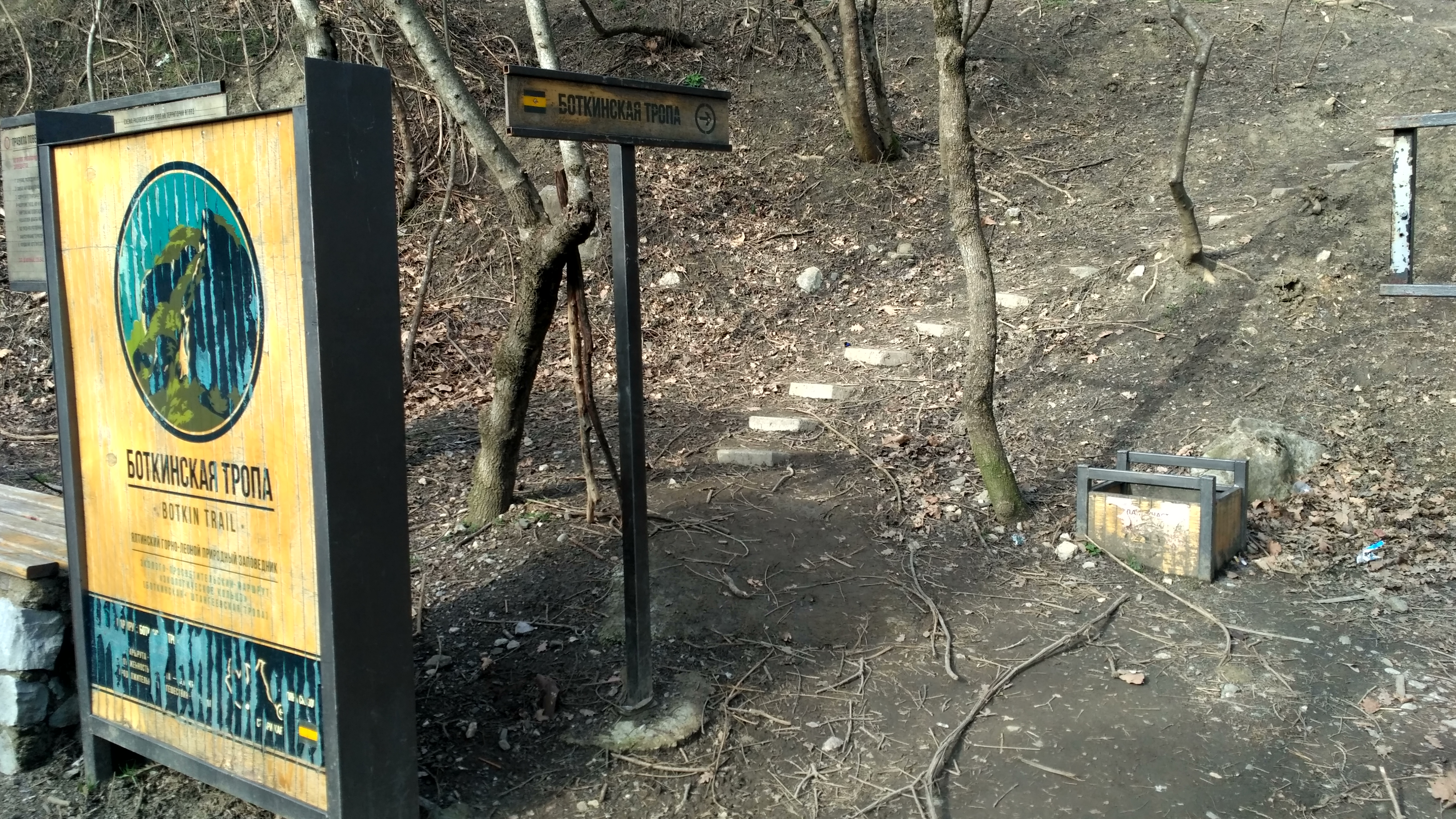 Начальная точка Боткинской тропы у Поляны сказок (улица Кирова, город Ялта)